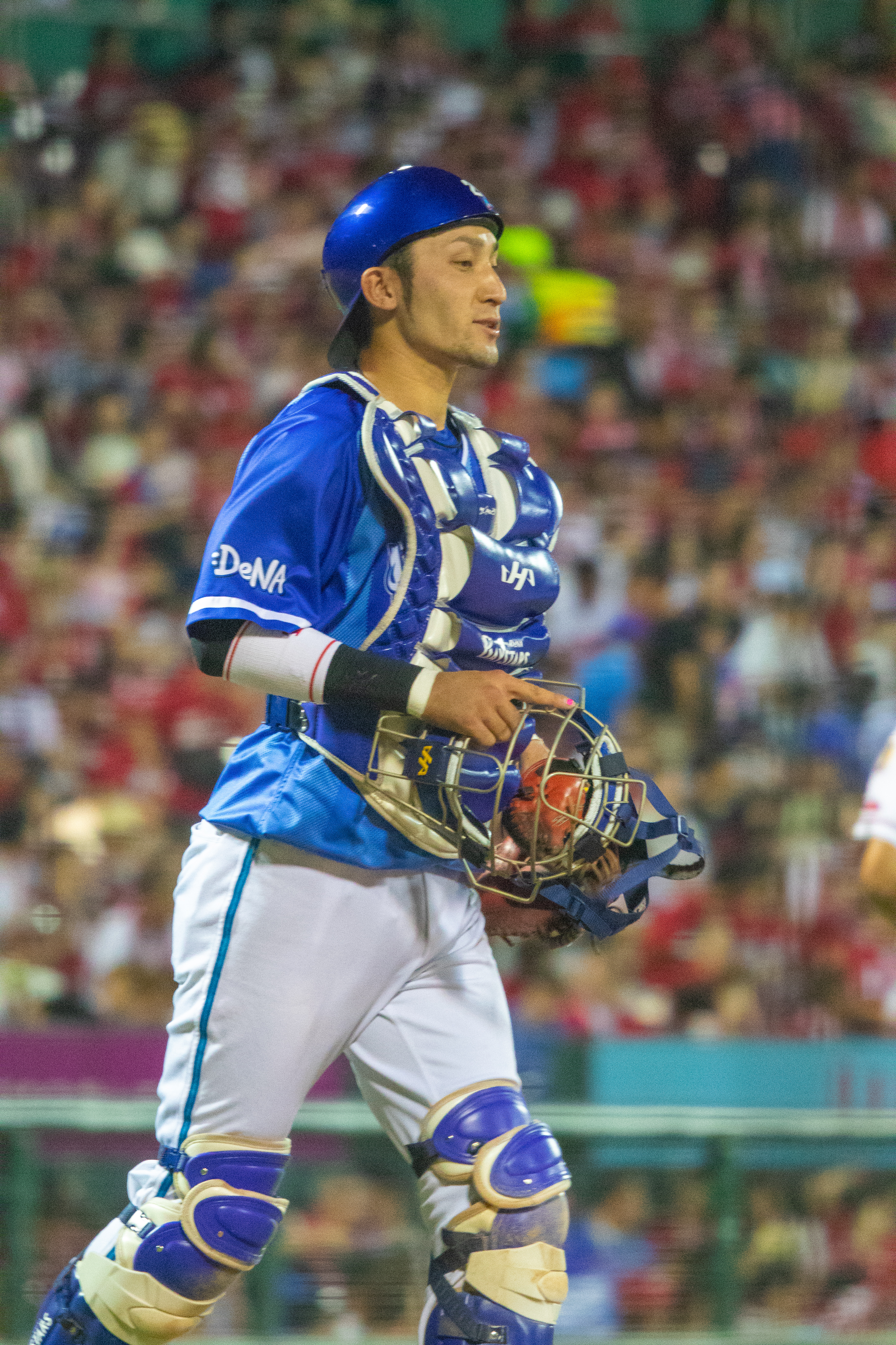 2018年7月28日 マツダスタジアム